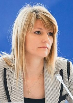 Светлана Сергеевна Журова (род.1972) — российская спортсменка, политический деятель